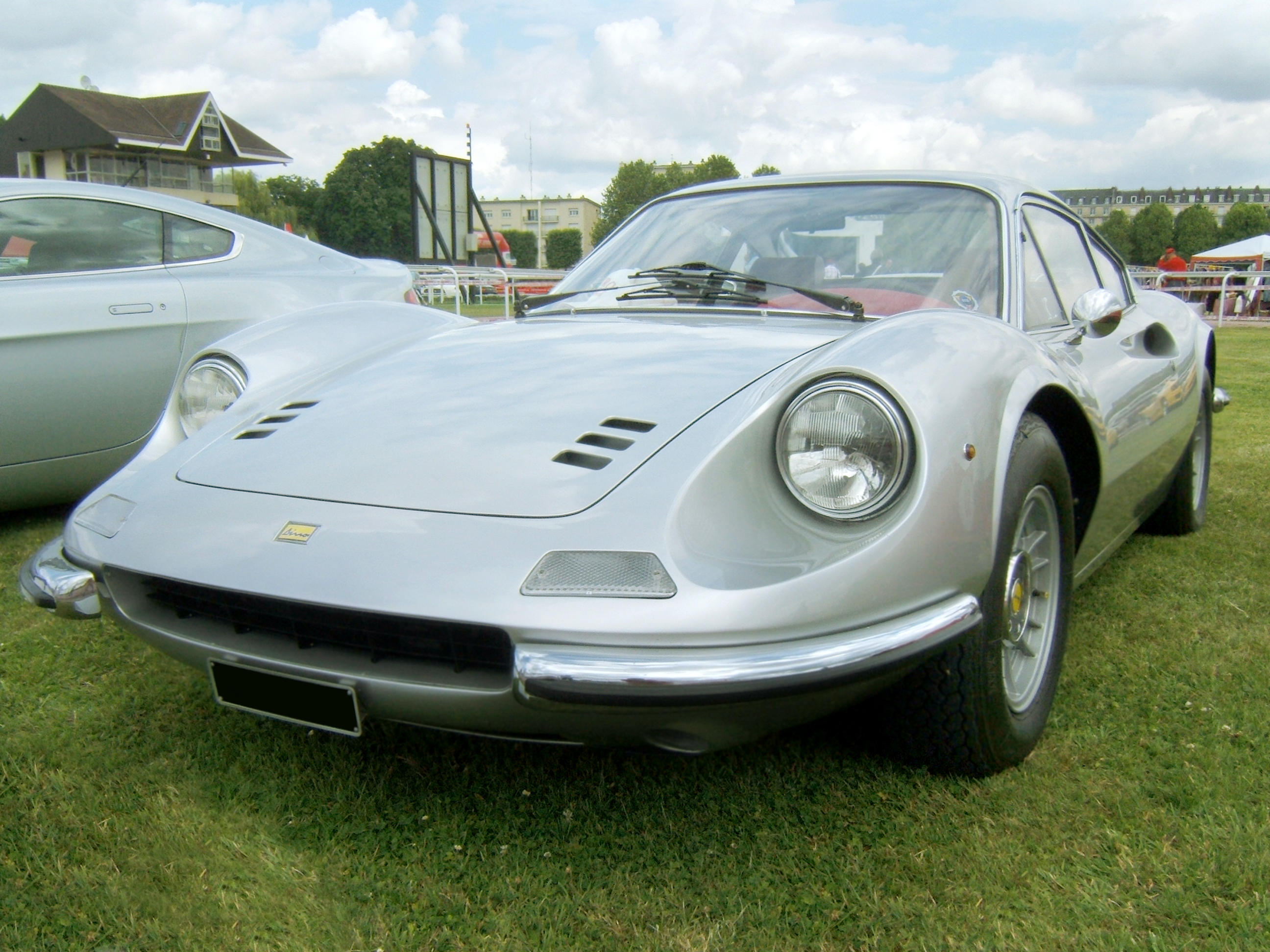 Ferrari Dino GT de 1972, dessinée par Aldo Brovarone.